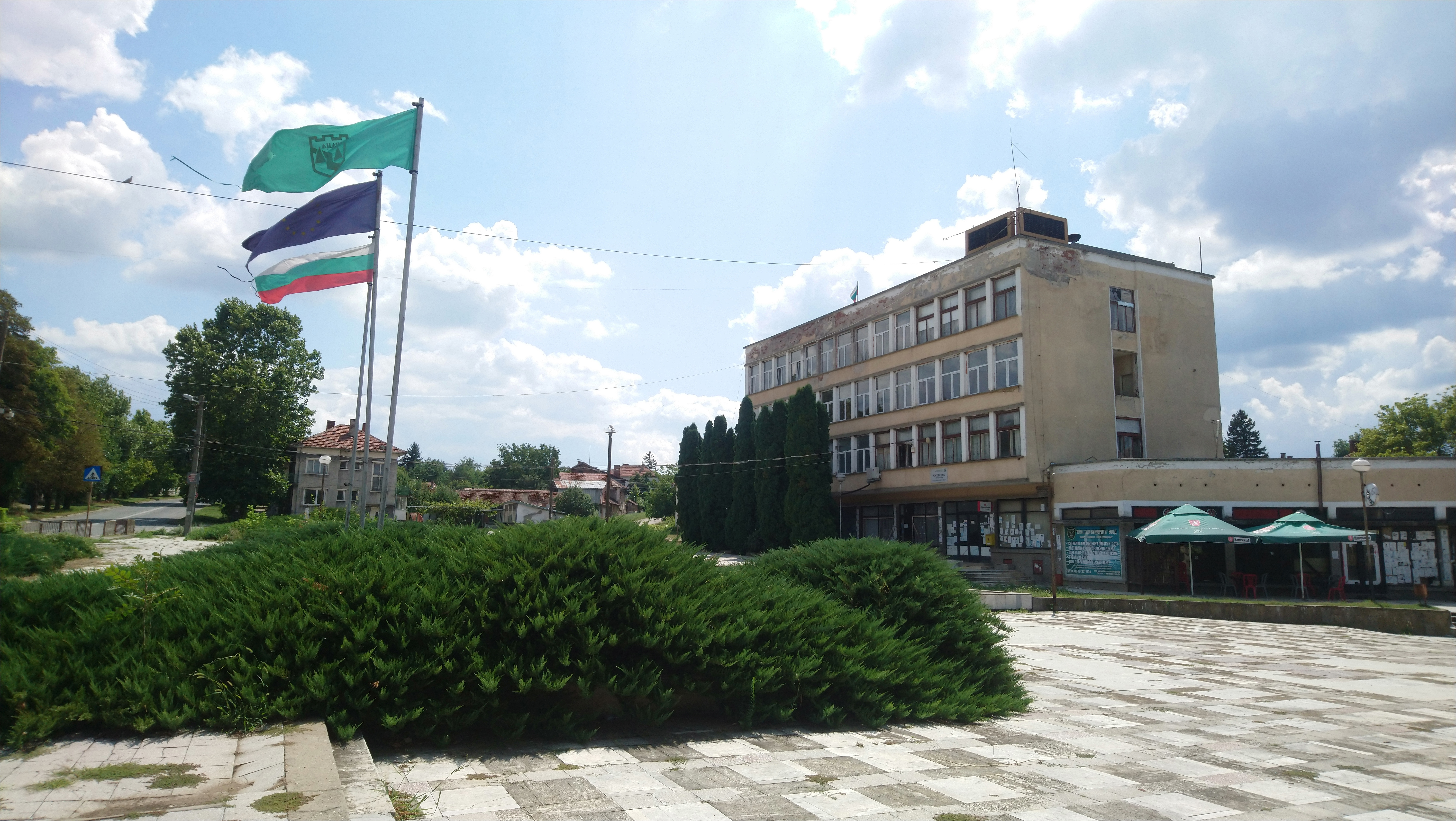 Кметството на село Баница, Община Враца